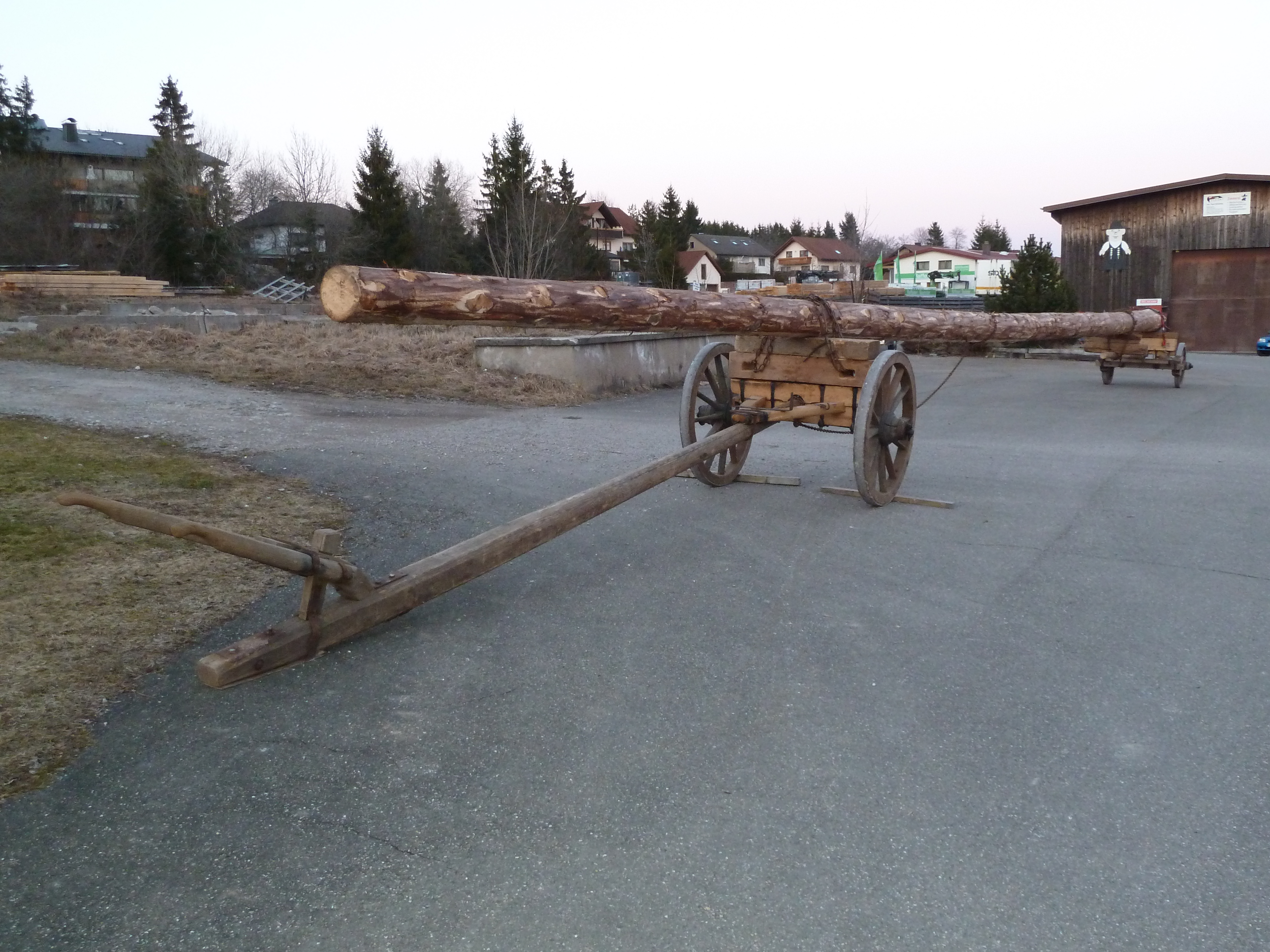 Narrenbaum von Bonndorf kurz vor dem Aufstellen